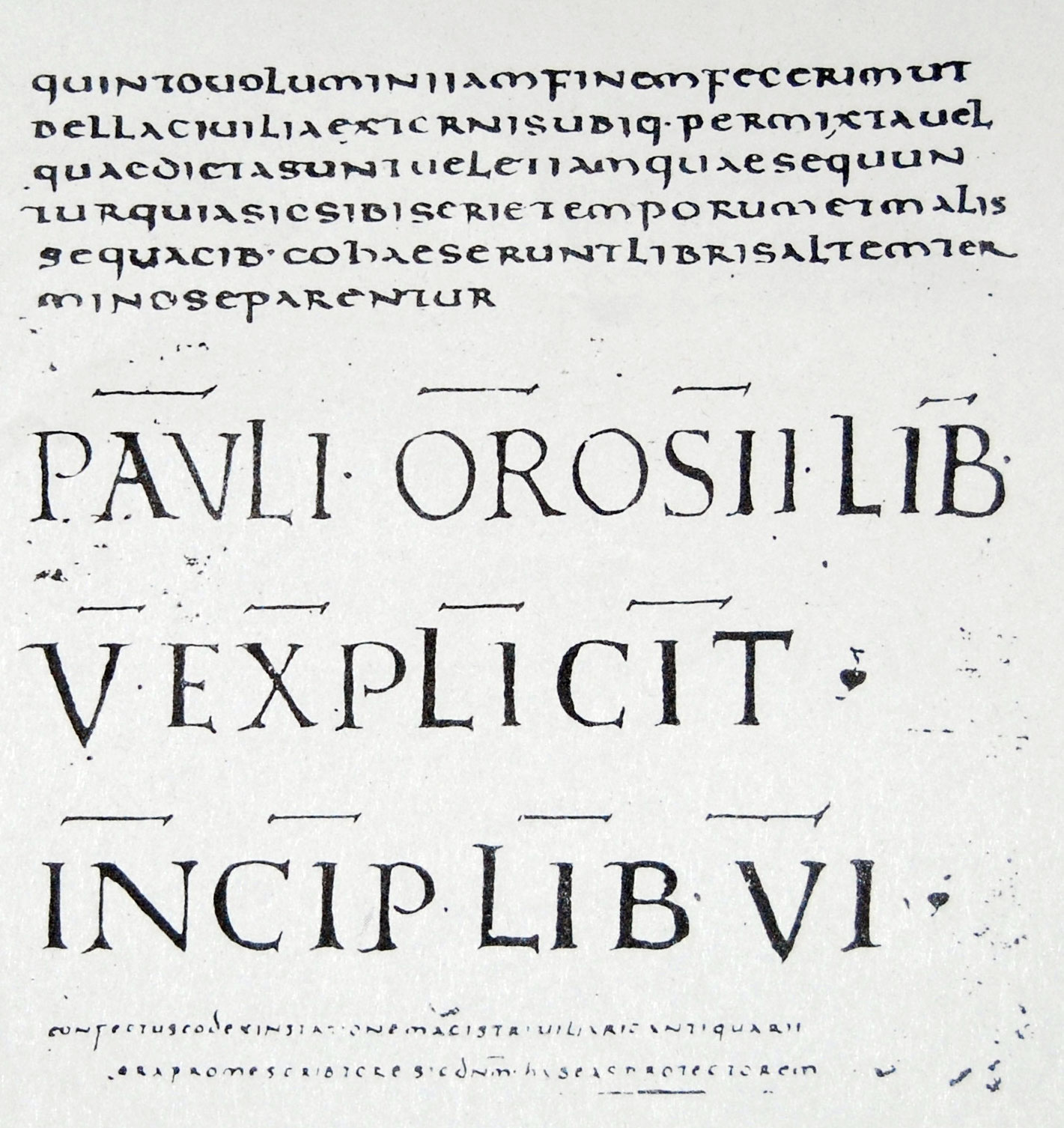 Lámina de un códice de Paulo Orosio conservado en Florencia.